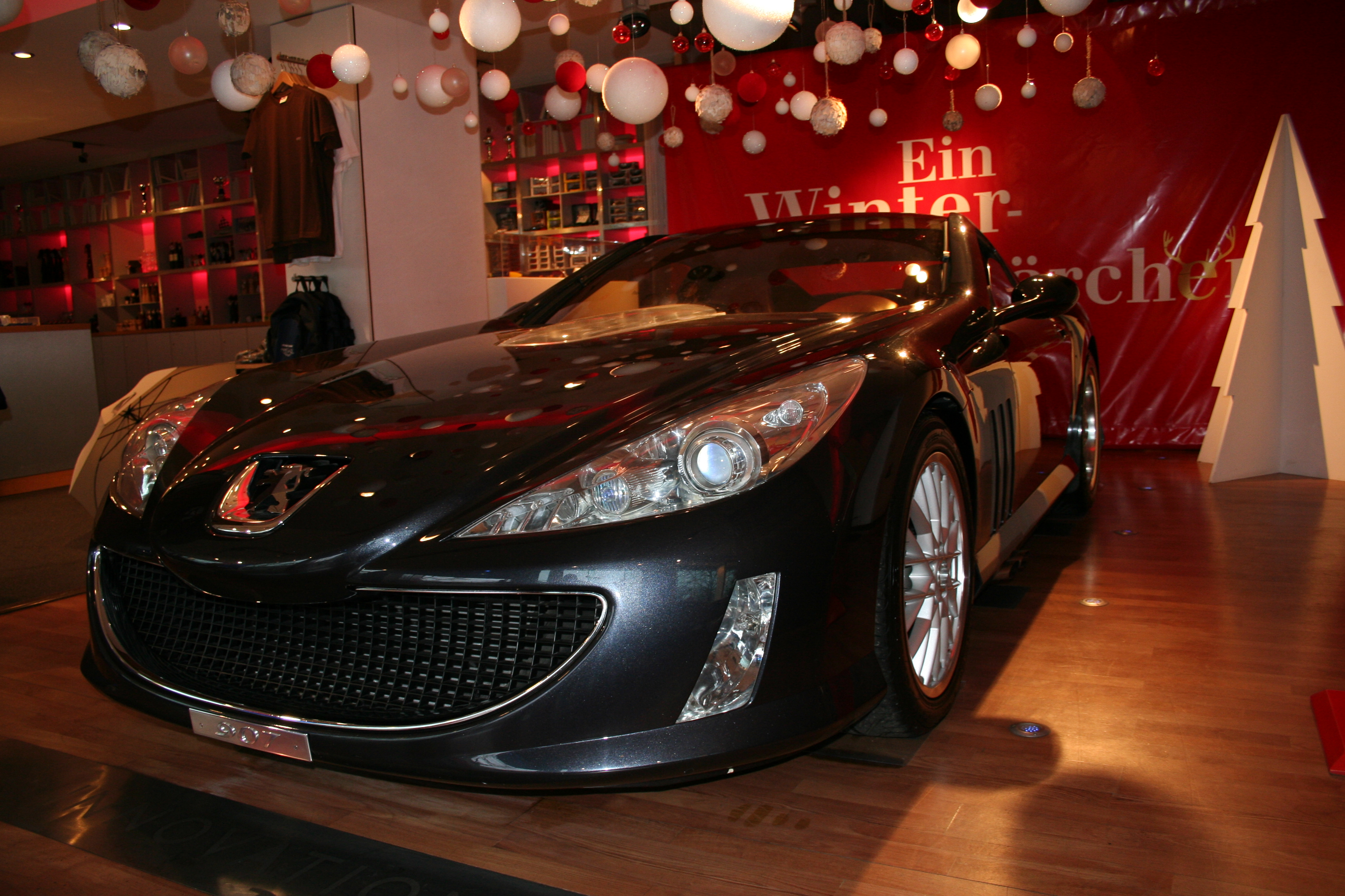 Peugeot 907 at Peugeot Center at Unter den Linden, Berlin